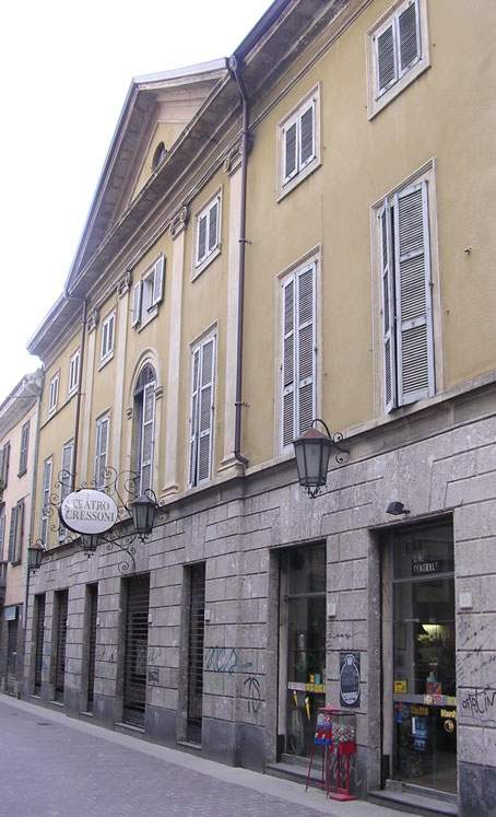 Esterno del Teatro Cressoni.